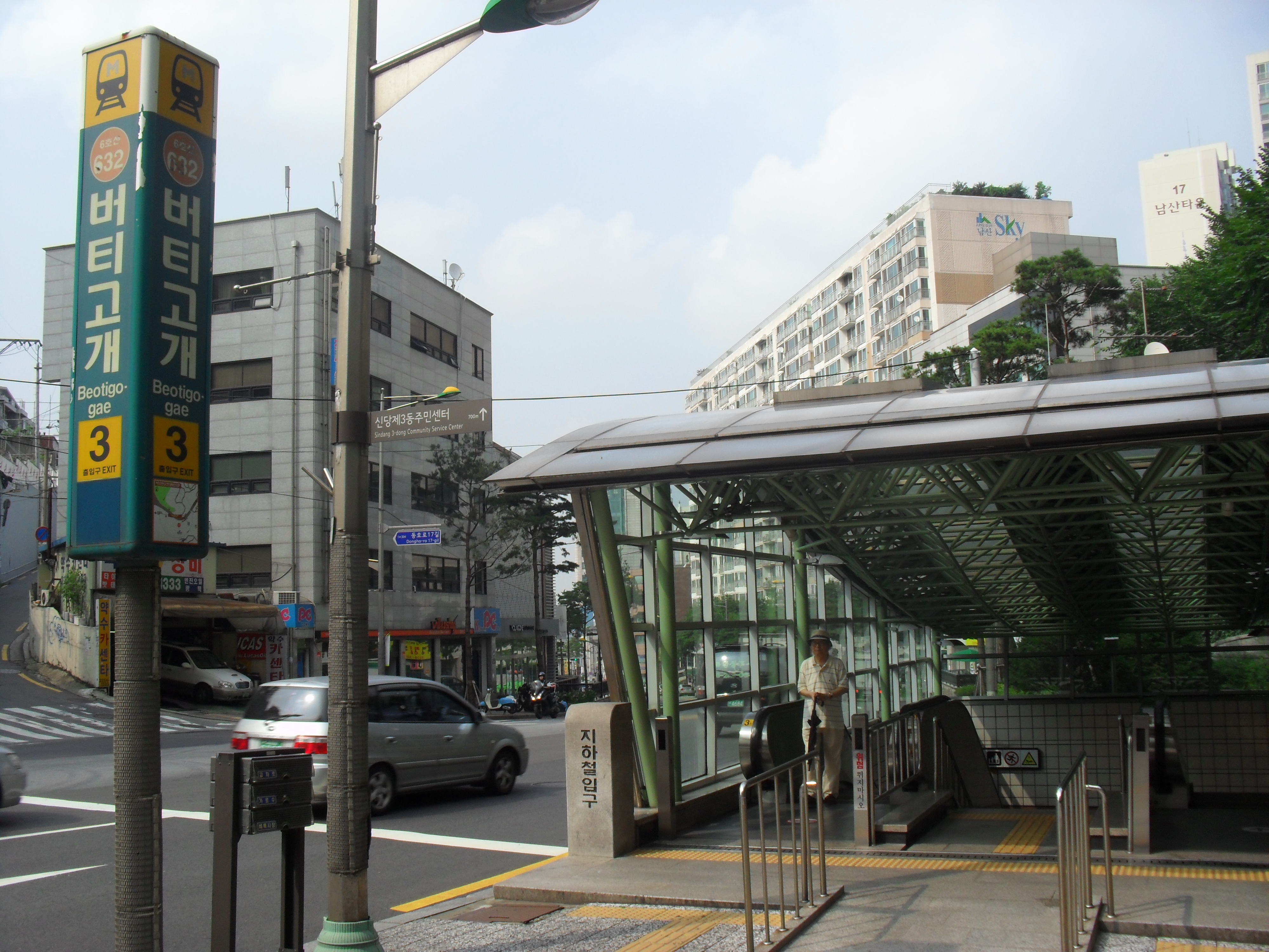 버티고개역 3번 출입구